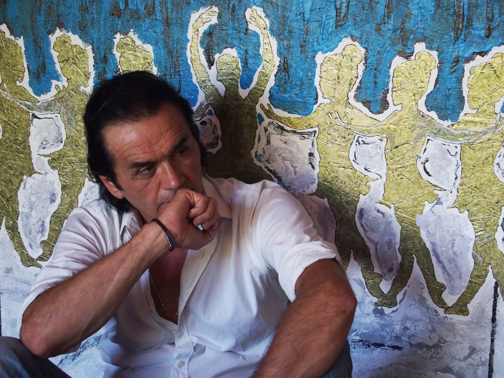 Immagine biografica del pittore Marcello Vandelli